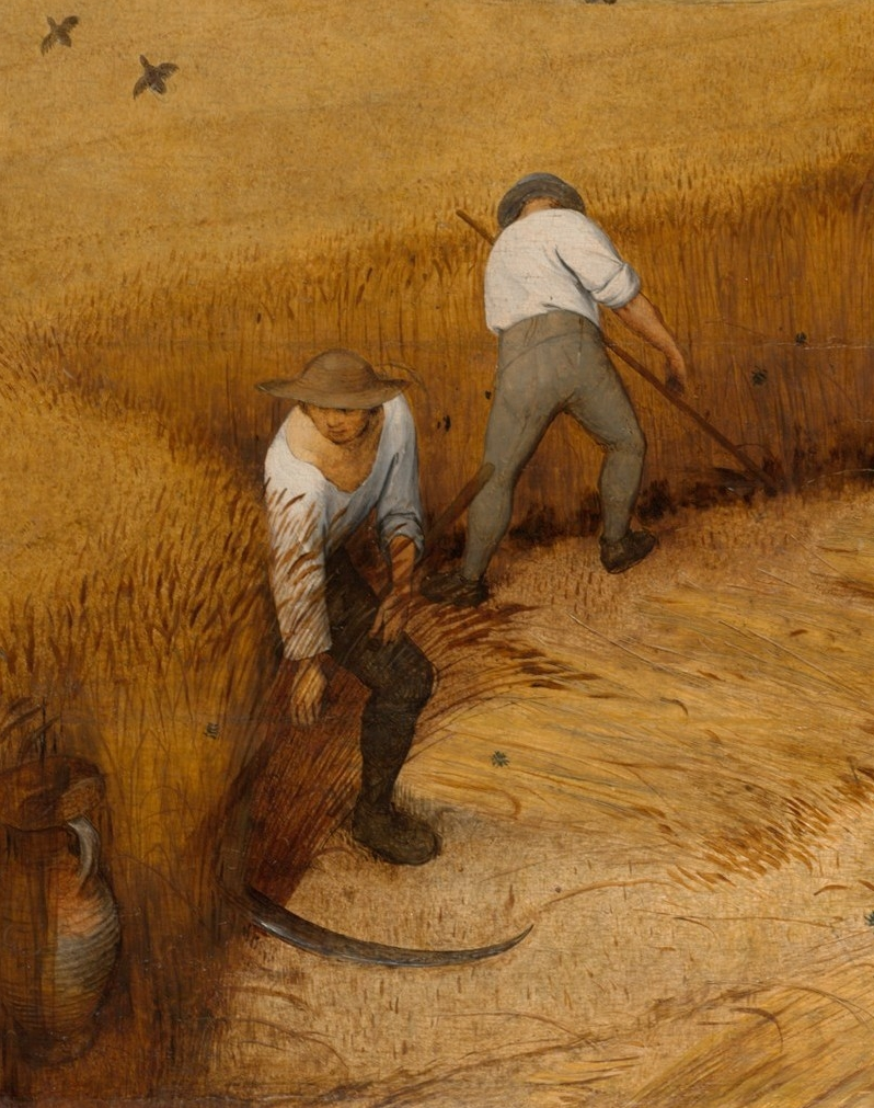 detail 1